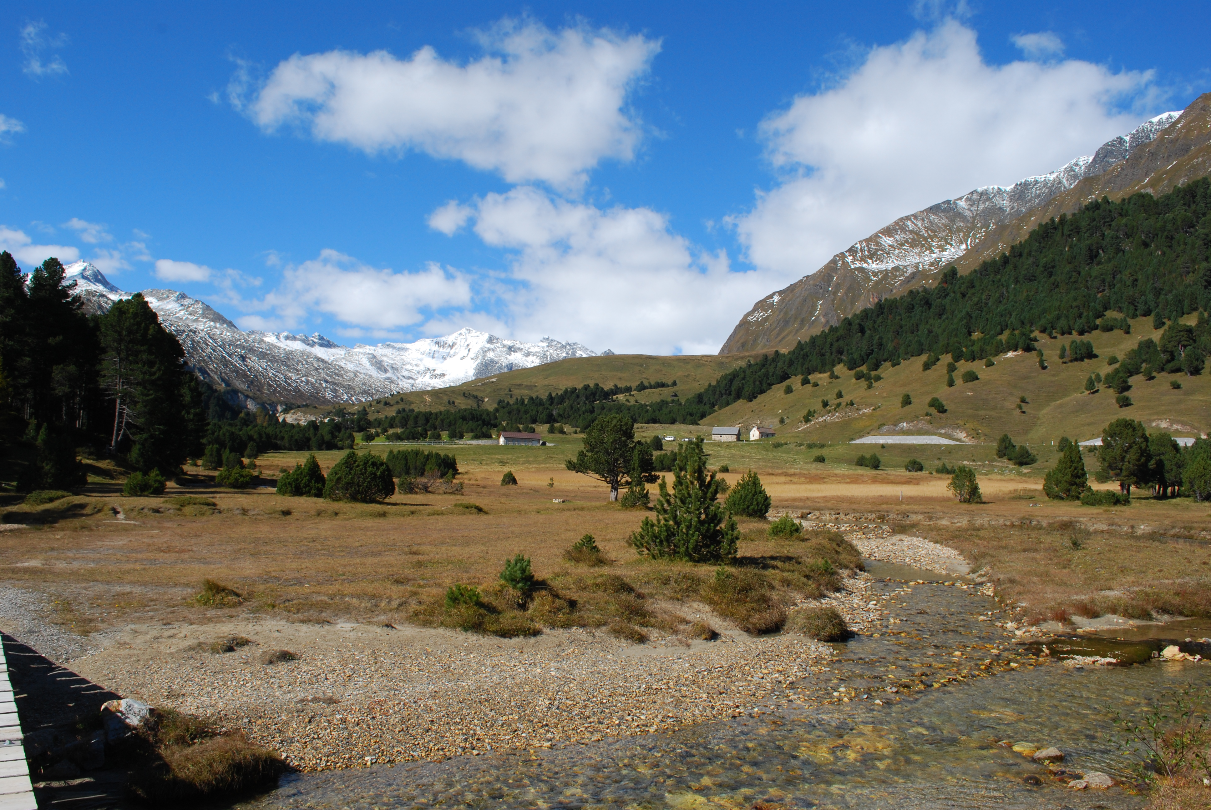 Passo del Lucomagno